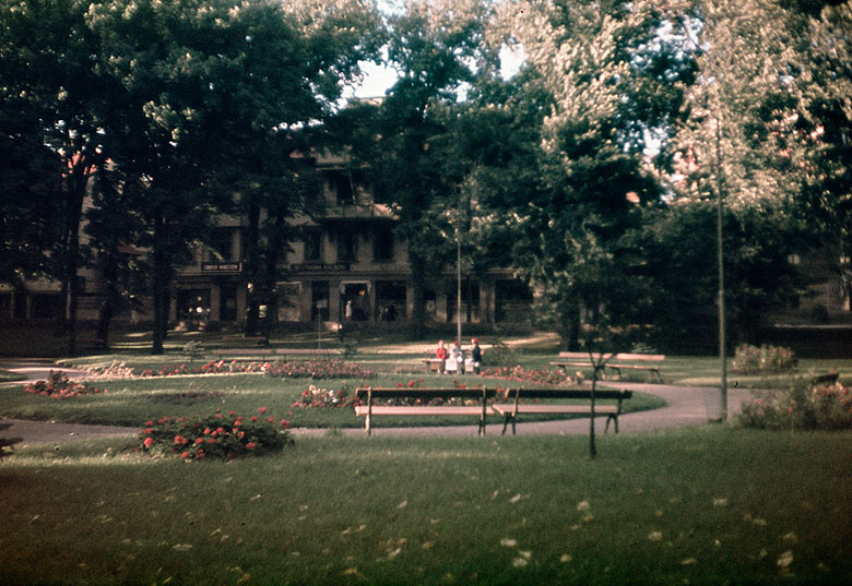 Stadsparken Motiv: Lysekil Nyckelord: Riksintressen Kategori: Kust- och skärgårdsmiljö, Stadspark Stadsparken.